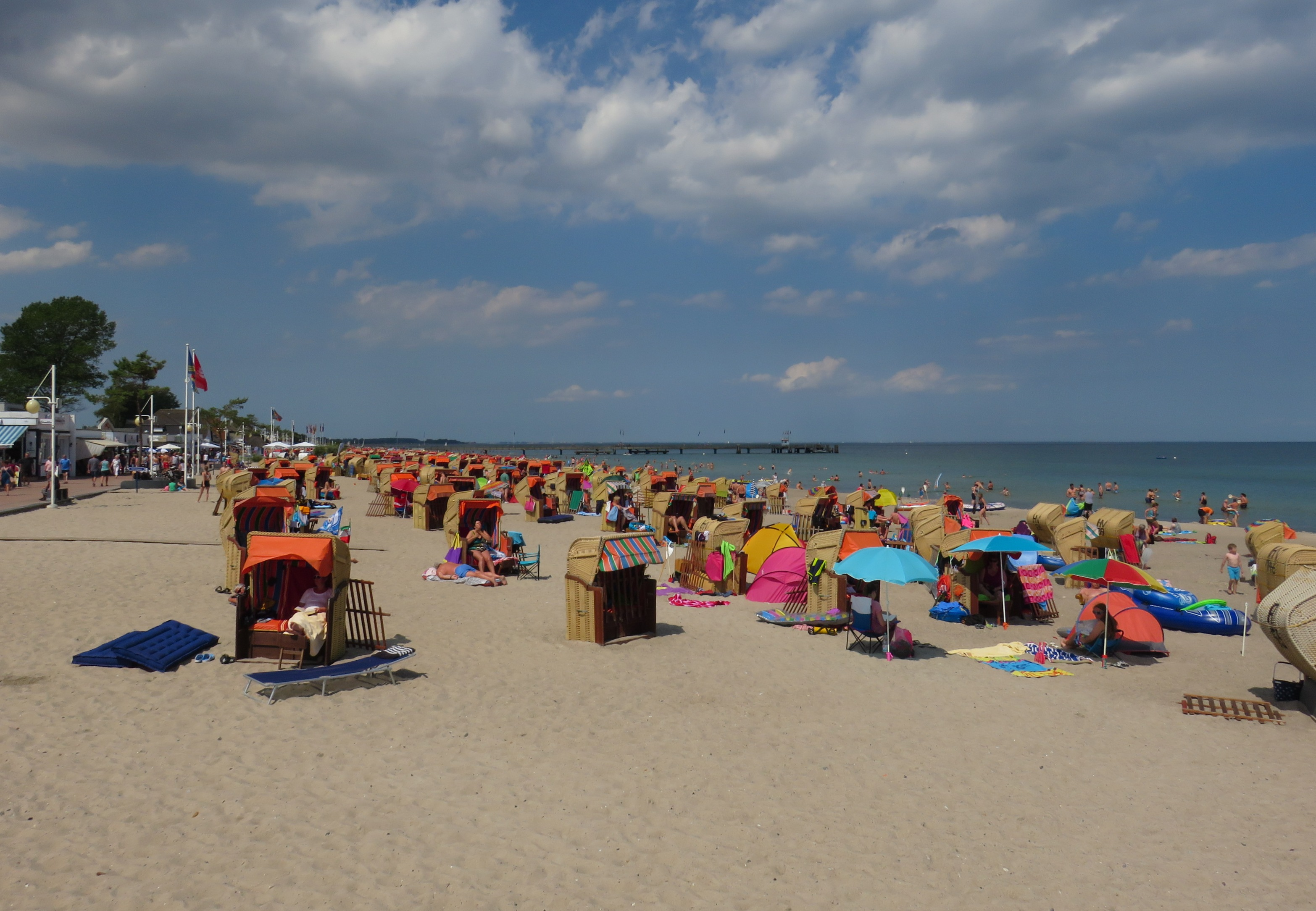 Dahmer Hauptstrand im Juli 2015